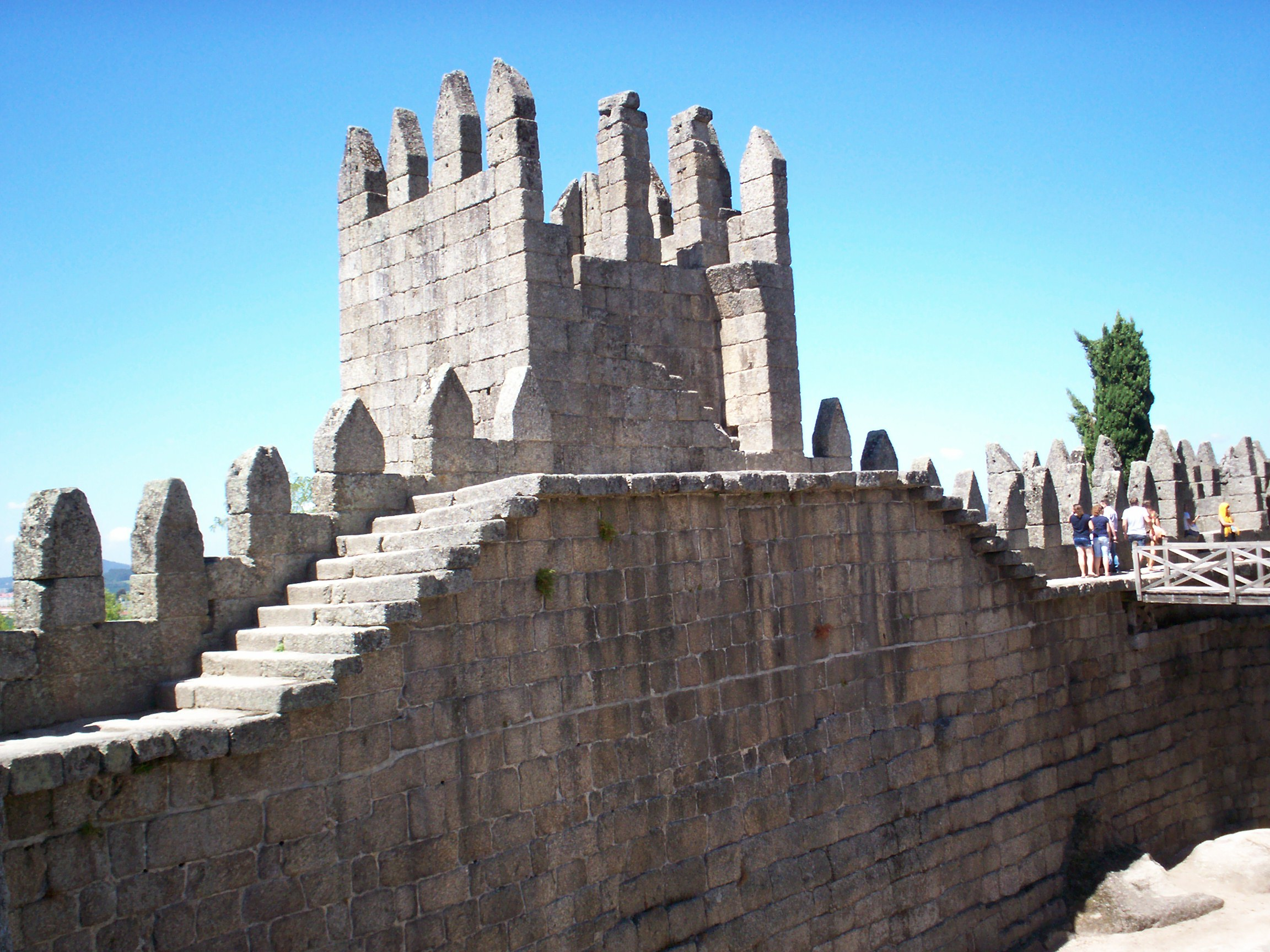 Castello Guimaraes, particolare